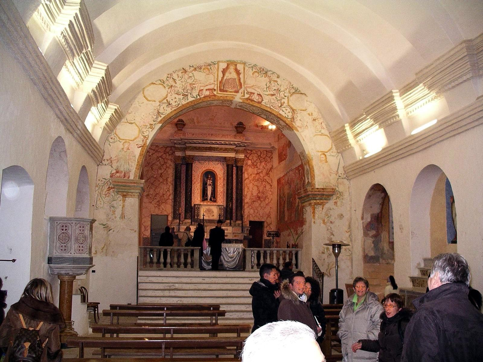 La seicentesca chiesa di Nostra Signora delle Grazie